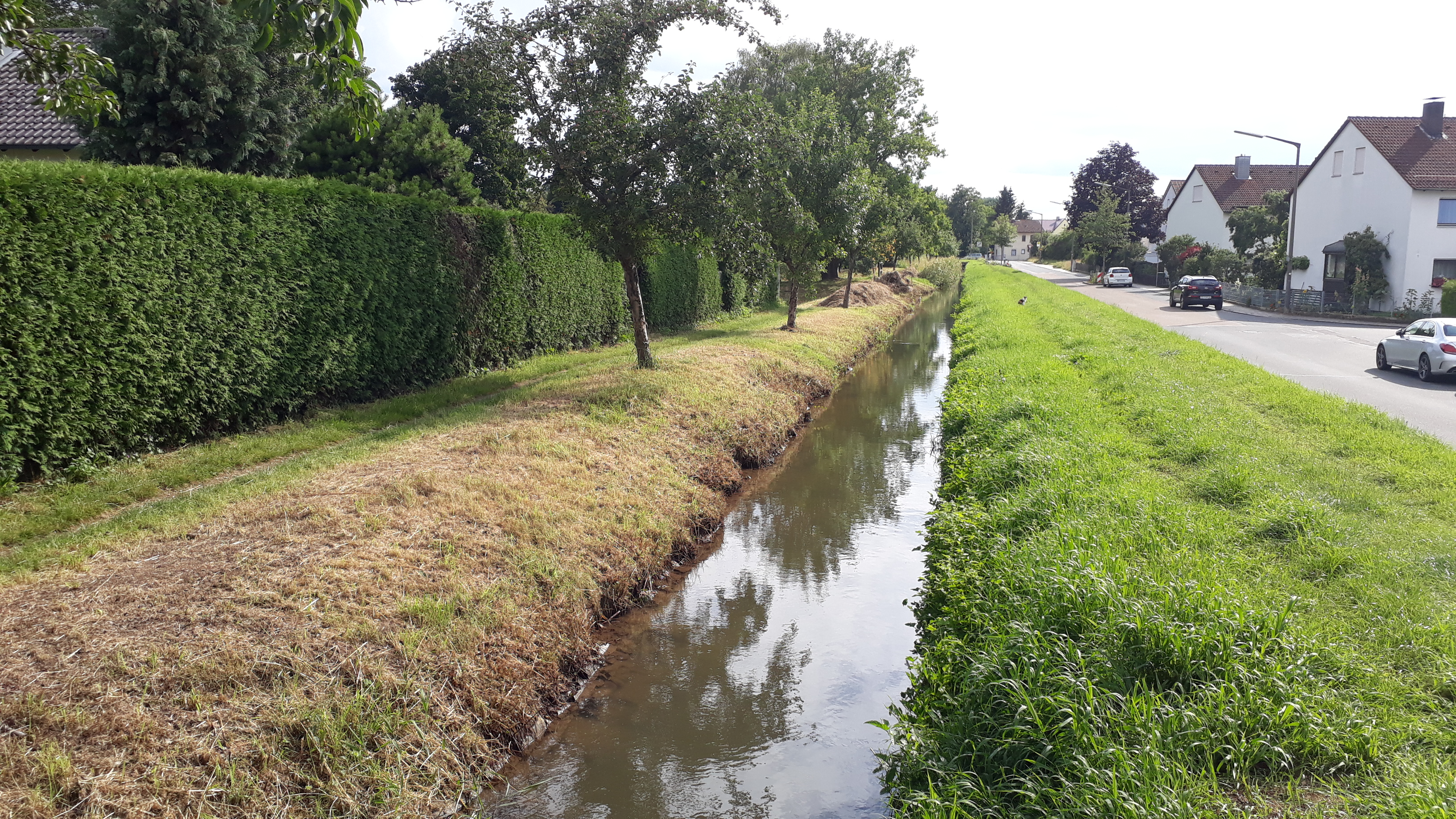 Ansicht des künstlich angelegten Pilsach-Leitgrabens in Neumarkt i.d.OPf. Hier im Abschnitt an der Wilhelm-Busch-Straße.